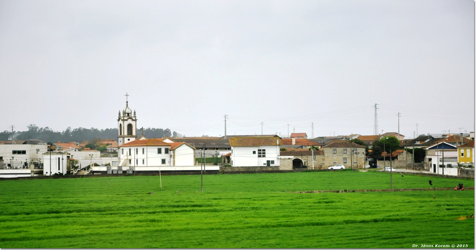 Porto 0123. Igreja de Labrouge